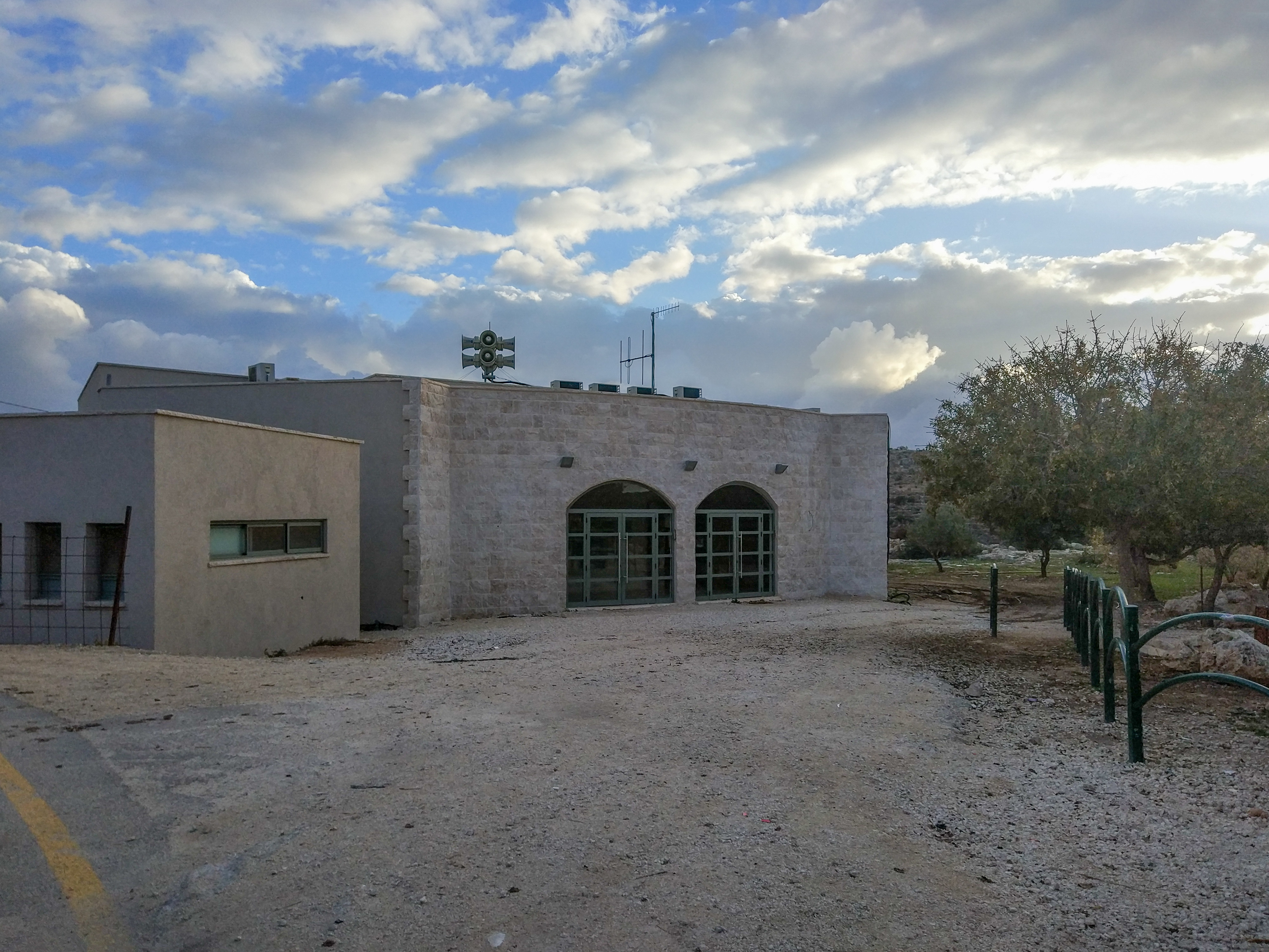 בית הכנסת החדש בחוות יאיר